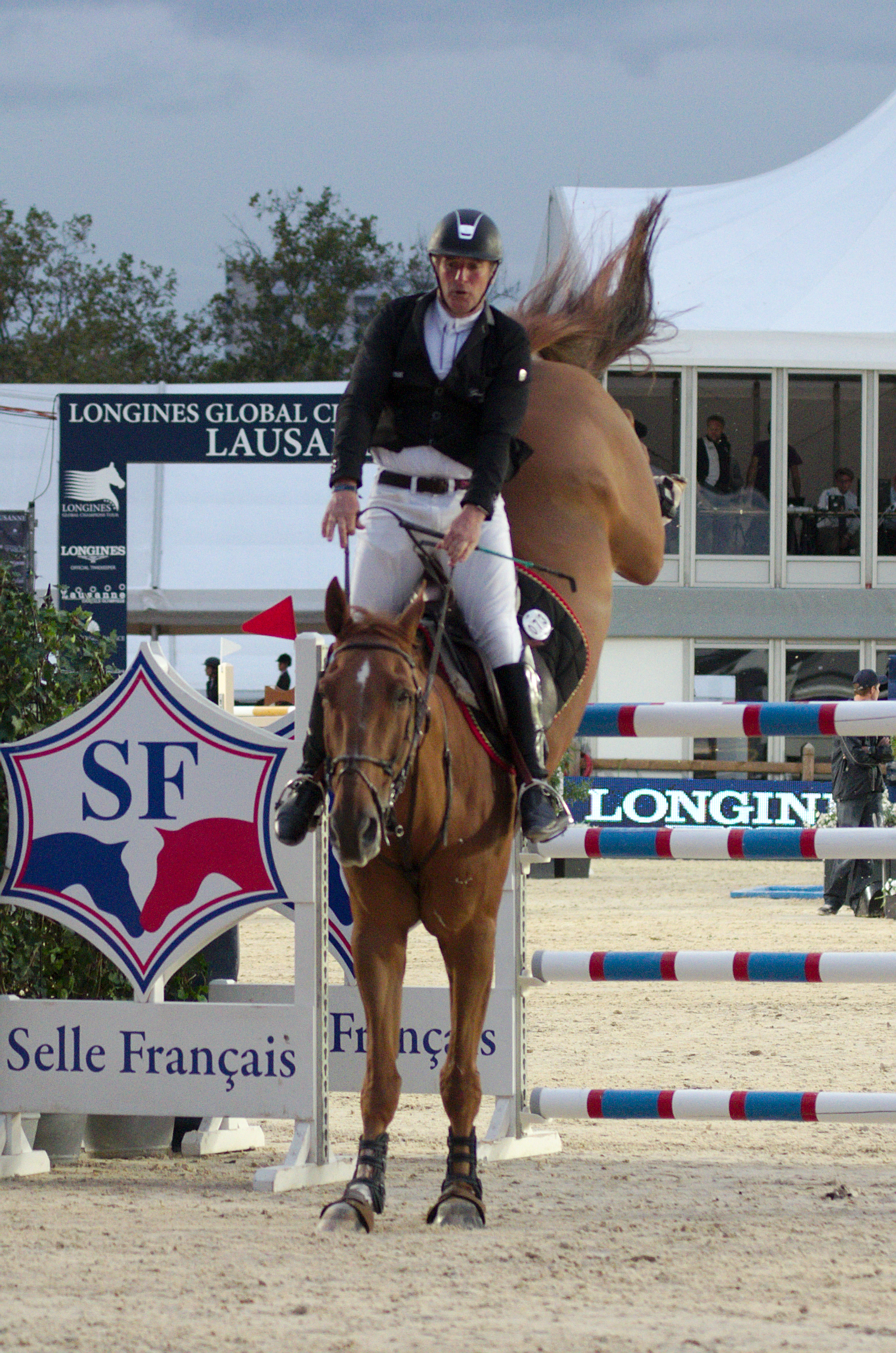 2013 Longines Global Champions - Lausanne - 14-09-2013 - Roger Yves Bost et Colombo van den Blauwaert